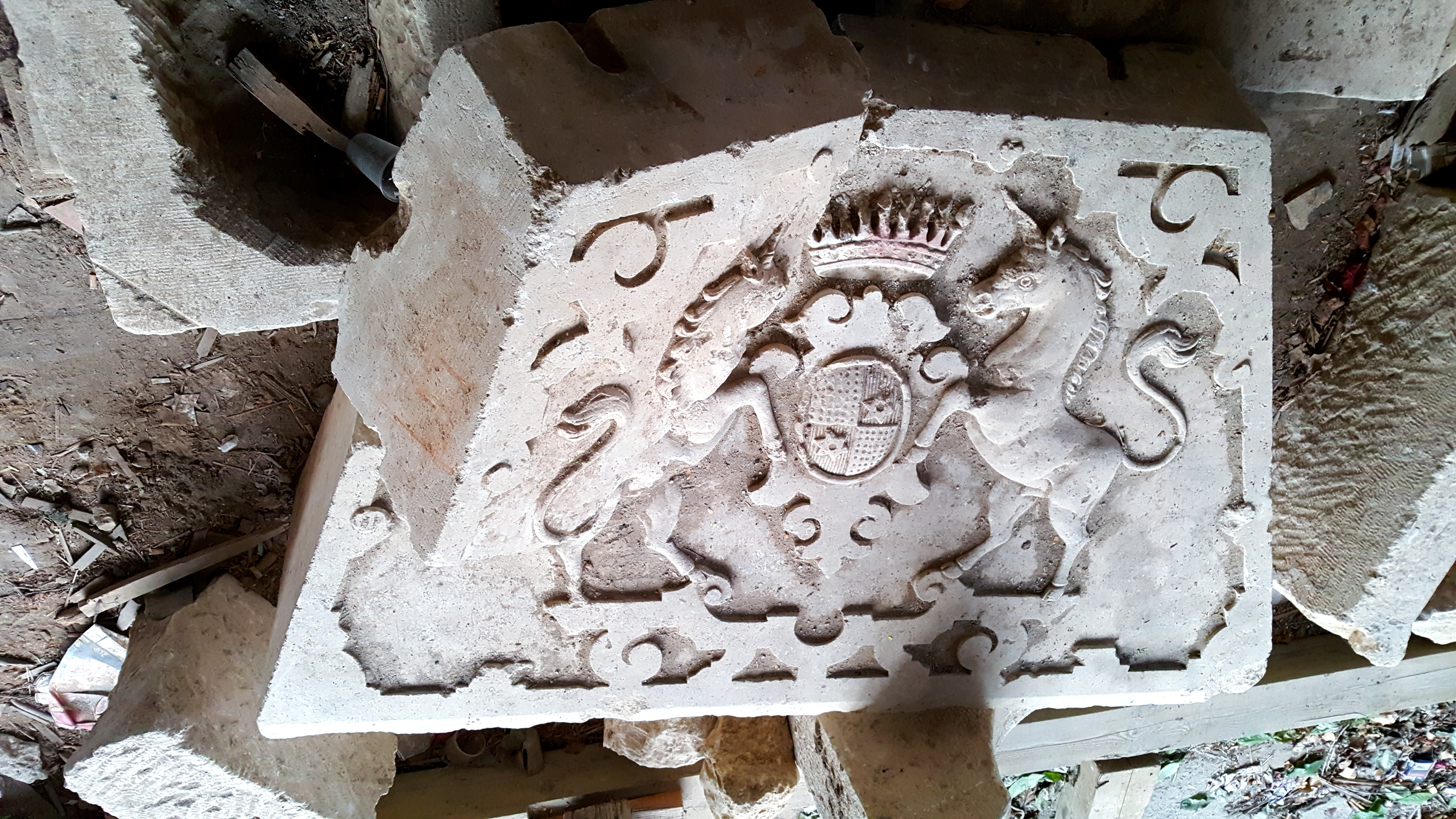 Arboretum Opeka